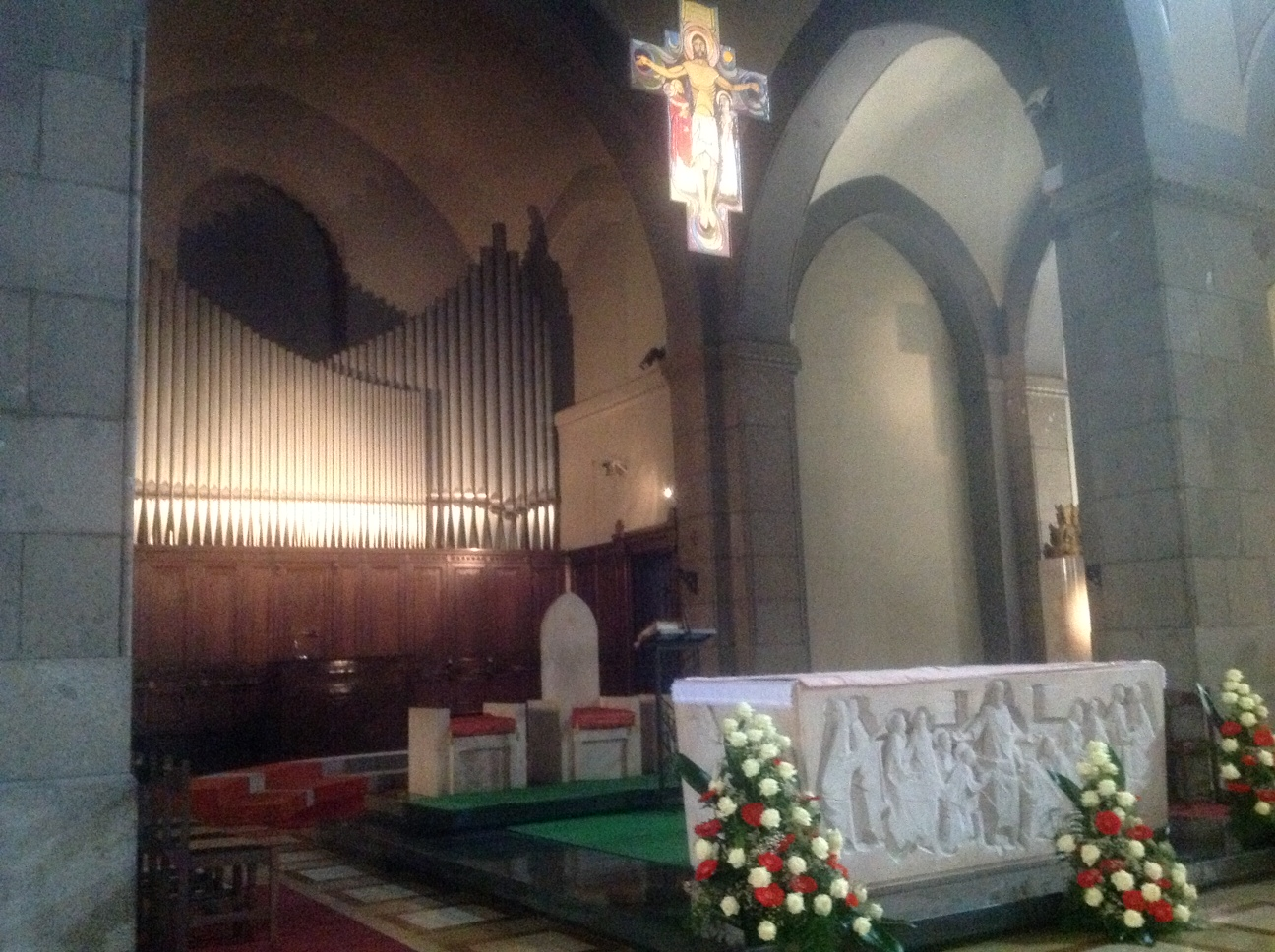 Il presbiterio della chiesa di San Gregorio Magno a Milano.